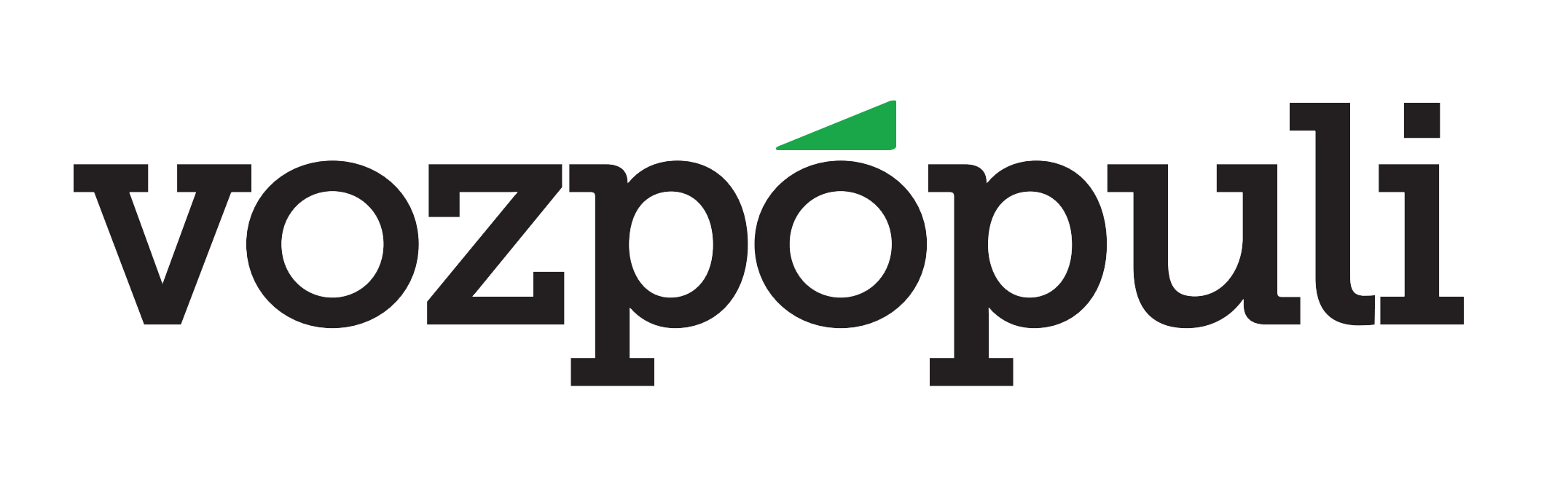 Logotipo de Vozpópuli